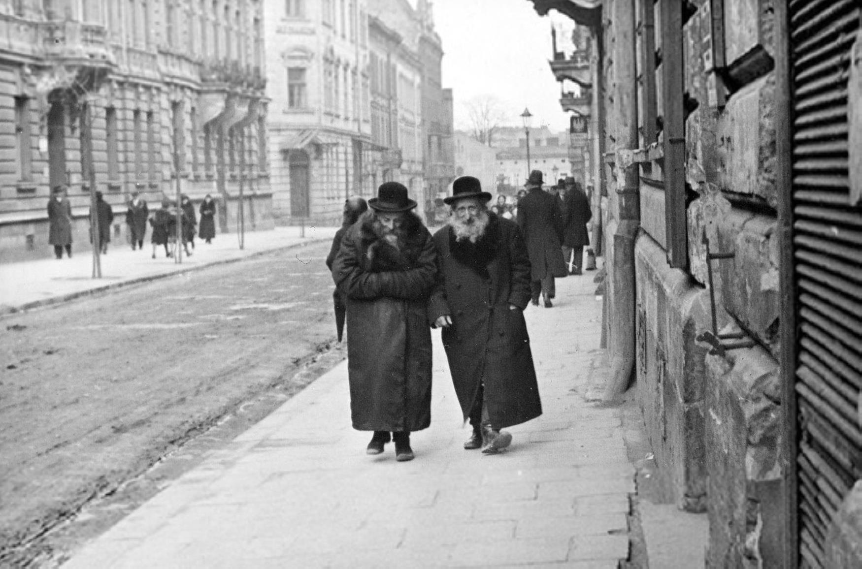 Єврейська дільниця у Львові - вул. Бернштайна (тепер Шолом-Алейхема), з лівої сторони позаду видна будівля установи єврейських ремісників Яд Харуцим і вхід до її синагоги (нині замурований), на задньому плані - Староцвинтарна синагога, що знаходилась на вул. Рапопорта.